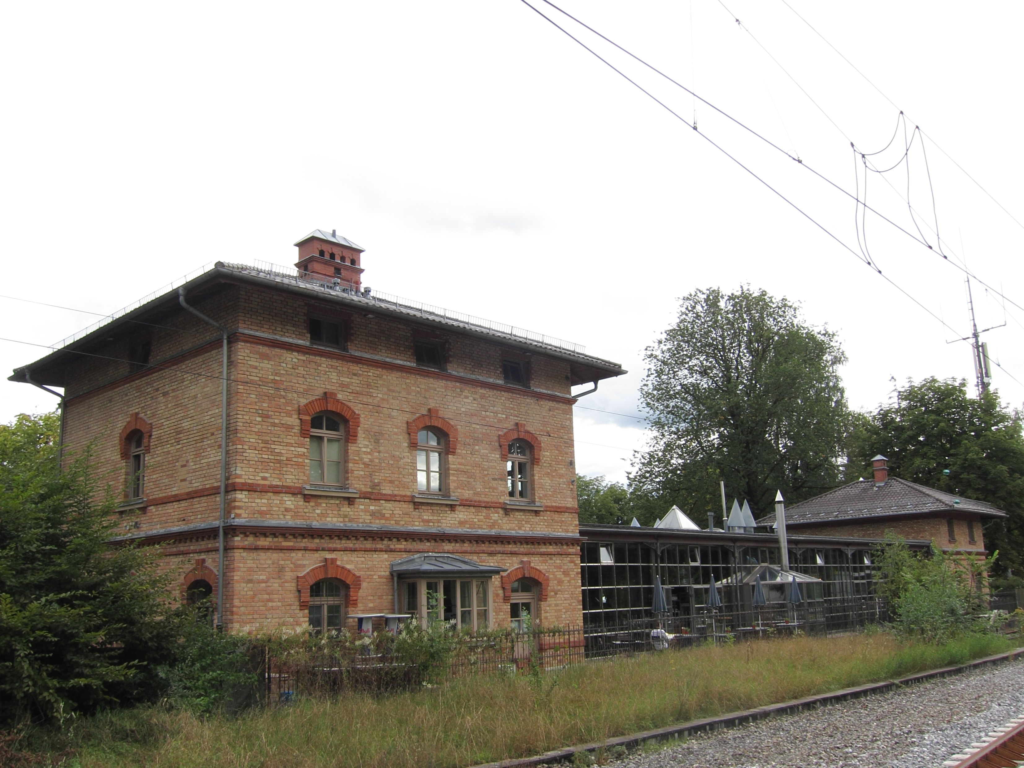 Kreuzeckstraße 23-25; Isartalbahnhof Großhesselohe; ehemaliger Bahnhof der Isartalbahn, zwei unterschiedlich große Pavillons, dazwischen erdgeschossiger Bahnsteigtrakt, roter und gelber Backstein, erbaut 1891; jetzt Gaststätte